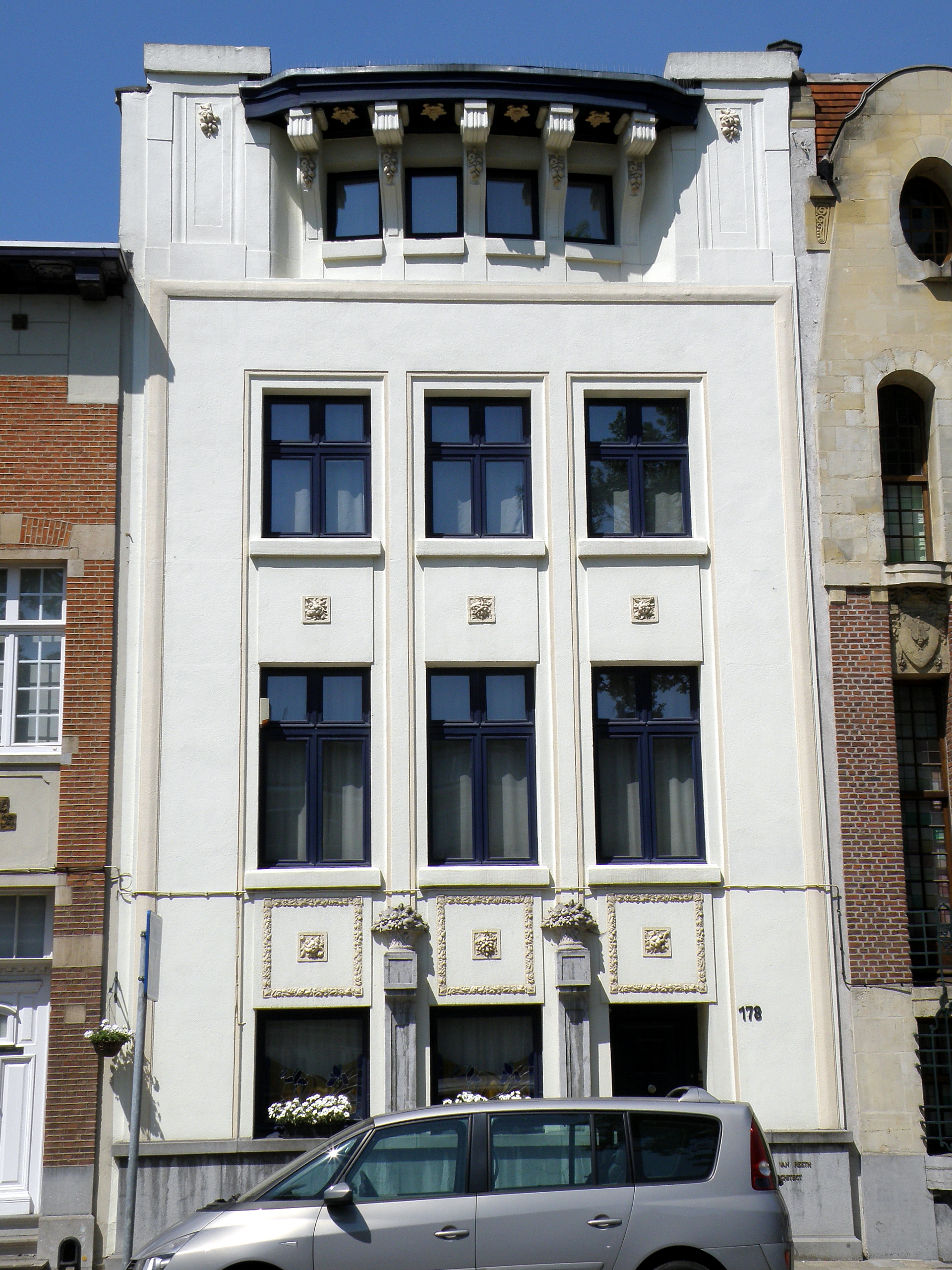 Antwerpen, distr. Deurne. Eigen woonhuis (naar eigen ontwerp) van arch. en schilder Flor Van Reeth, gelegen Boekenberglei nr. 178. Gebouwd 1924-26. Vgl. Vlaams Instituut voor Bouwkundig Erfgoed.